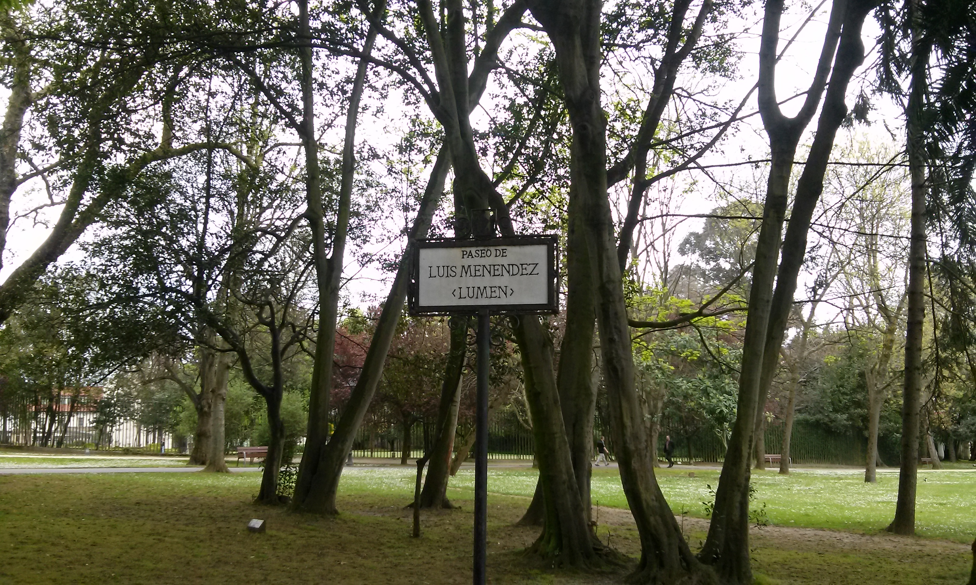 Placa, en el Parque Ferrera, que señala el Paseo que lleva el nombre de Luis Menéndez Alonso "Lumen".